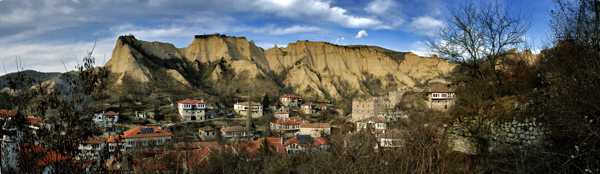 Панорама на град Мелник и Мелнишките пирамиди.